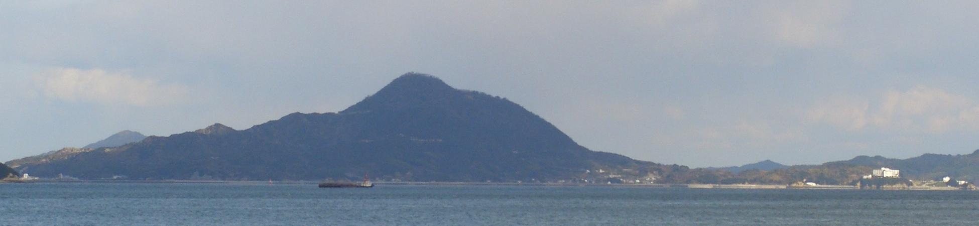 岩城島を西方7kmから撮影